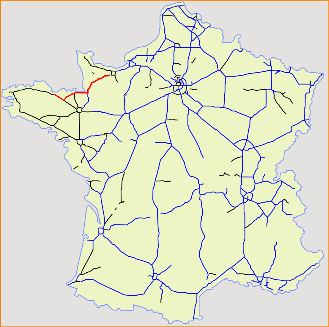 Route européenne 401